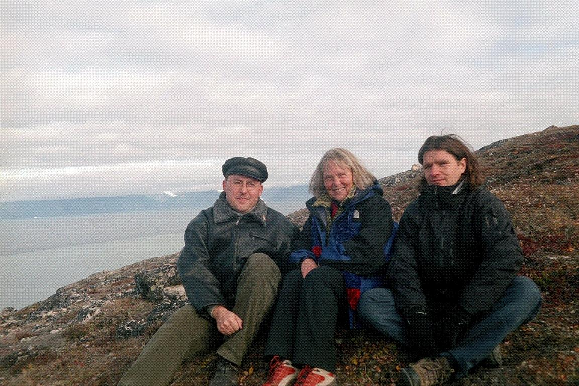 Team André Kaiser, Helga Spande, Mirko Stelzner (v.l.n.r.) 2005 in Pond Inlet